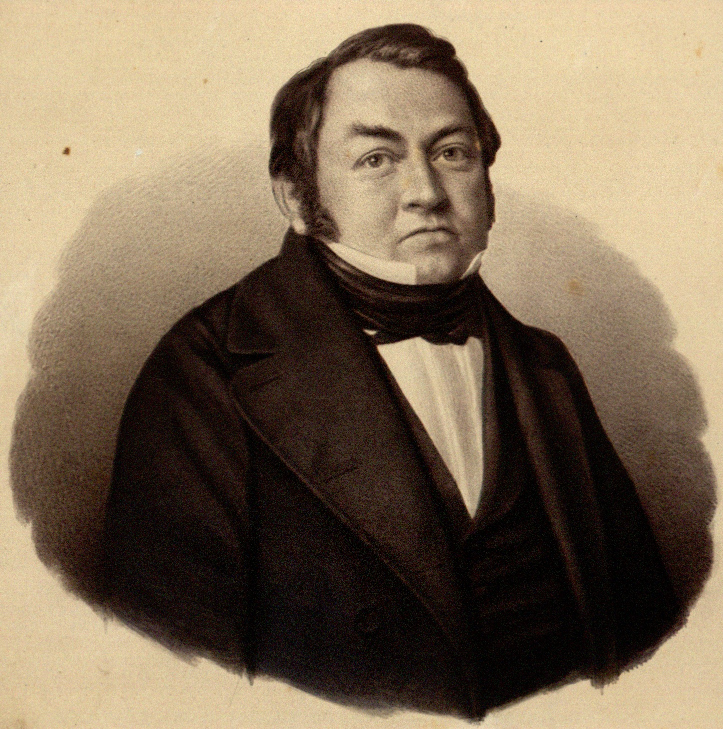 Depicted person: Theophor Wilhelm Dittenberger, 1833–1852 Mitglied der Theologischen Fakultät in Heidelberg